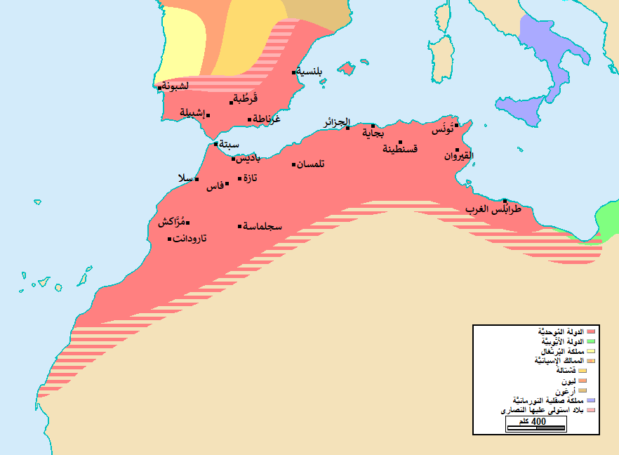 خريطة الدولة المُوحديَّة.